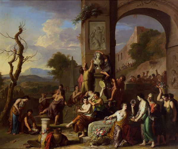 Opferfest Amongst Antique Ruins